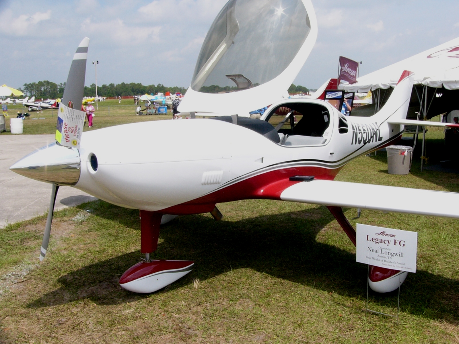 Lancair Legacy FG at Sun 'n Fun 2006